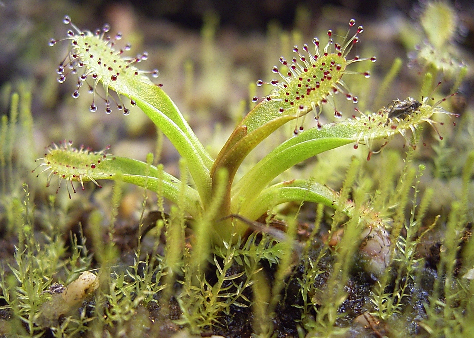 Drosera arcturi habitus